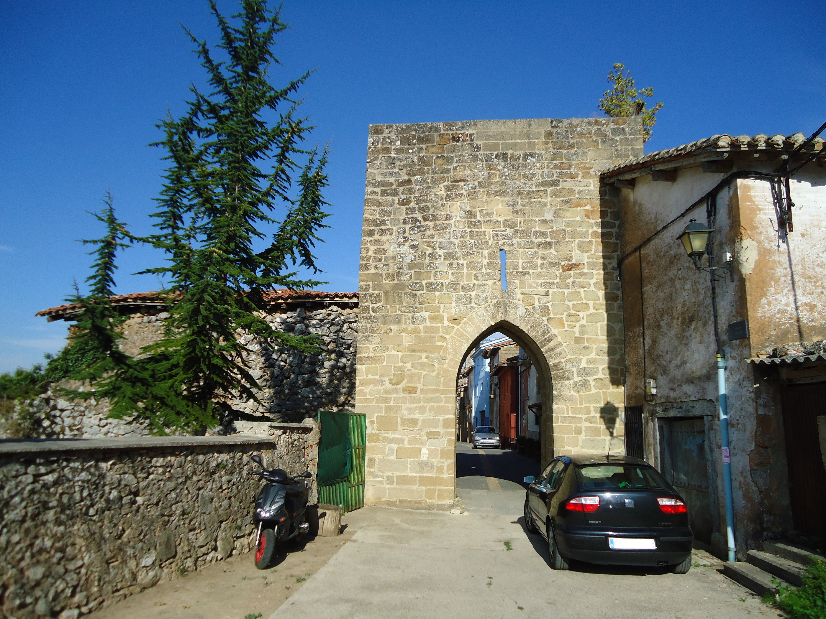 Bernedoko (Araba) harresiaren ate bat